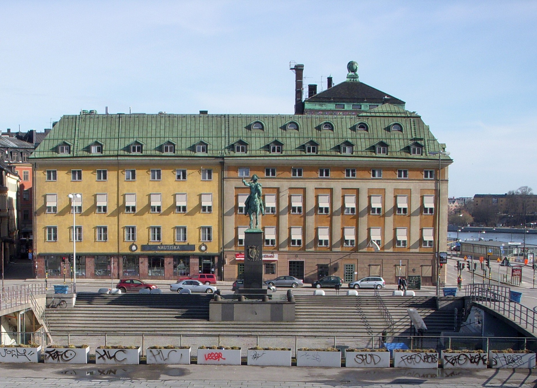 Räntmästarhuset i kvateret Achilles, Gamla stan, Skeppsbon